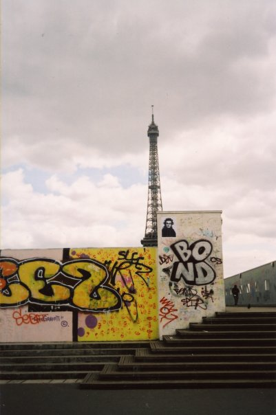 john hamon